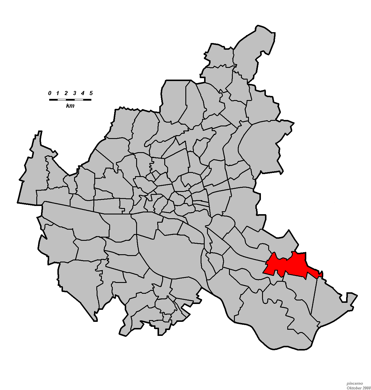 Hamburg, Stadtteil Bergedorf.